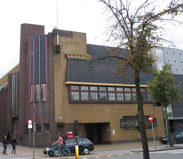 Gebouw in de stijl van de Amsterdamse School gebouwd door Siebe Jan Bouma aan het Gedempte Zuiderdiep in de stad Groningen (The Netherlands)